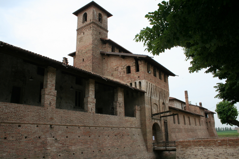 Pagazzano BG, Castello Visconteo.